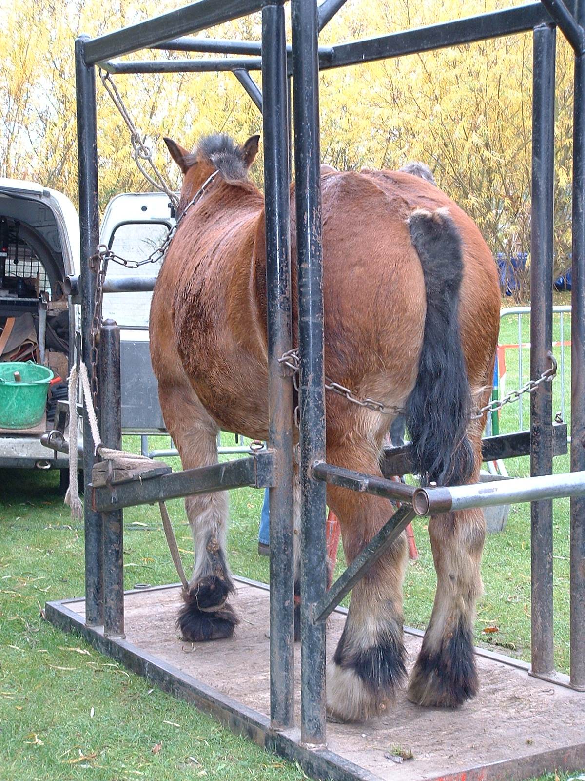 Le "travail", c'est le nom de cette espèce de construction métallique dans laquelle on place le cheval pendant les opérations de ferrage. Le cheval est une pouliche de 30 mois, espèce régionale "Trait du Nord".